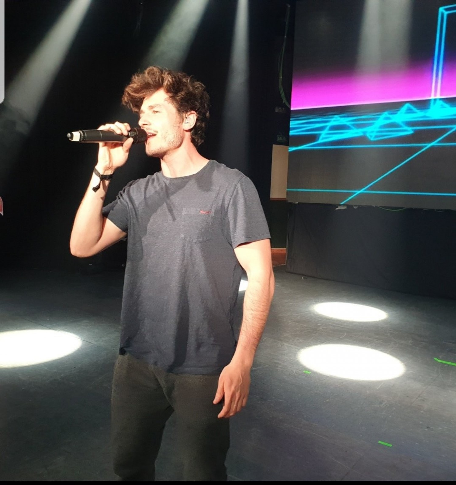 El cantante Miki Núñez durante los ensayos de la #PrePartyES19 de Madrid el 19 de abril de 2019.